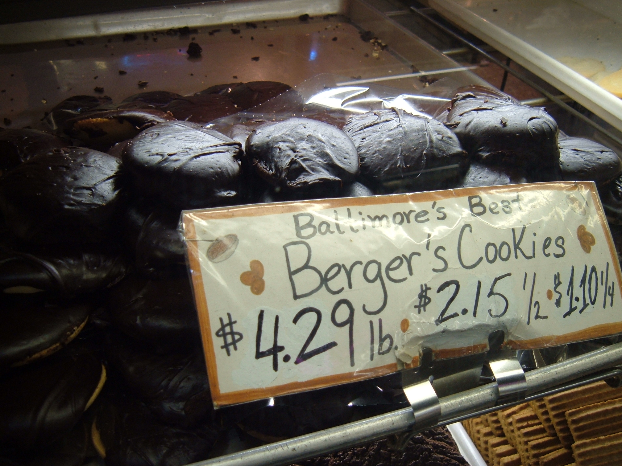 Berger cookiesberger's